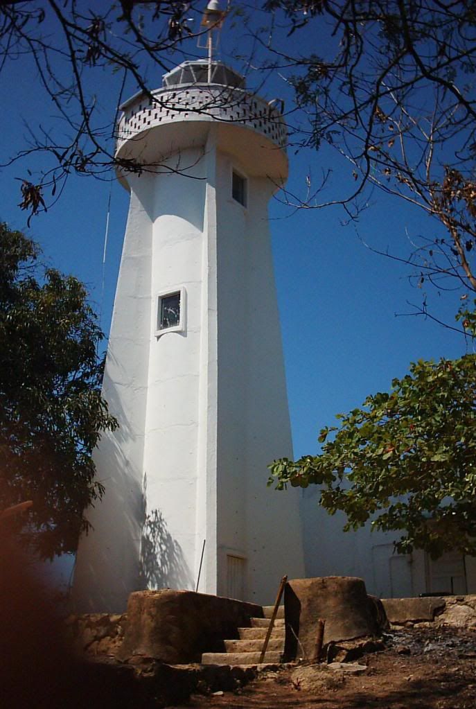 faro a 115 msnmm, señal de navegacion